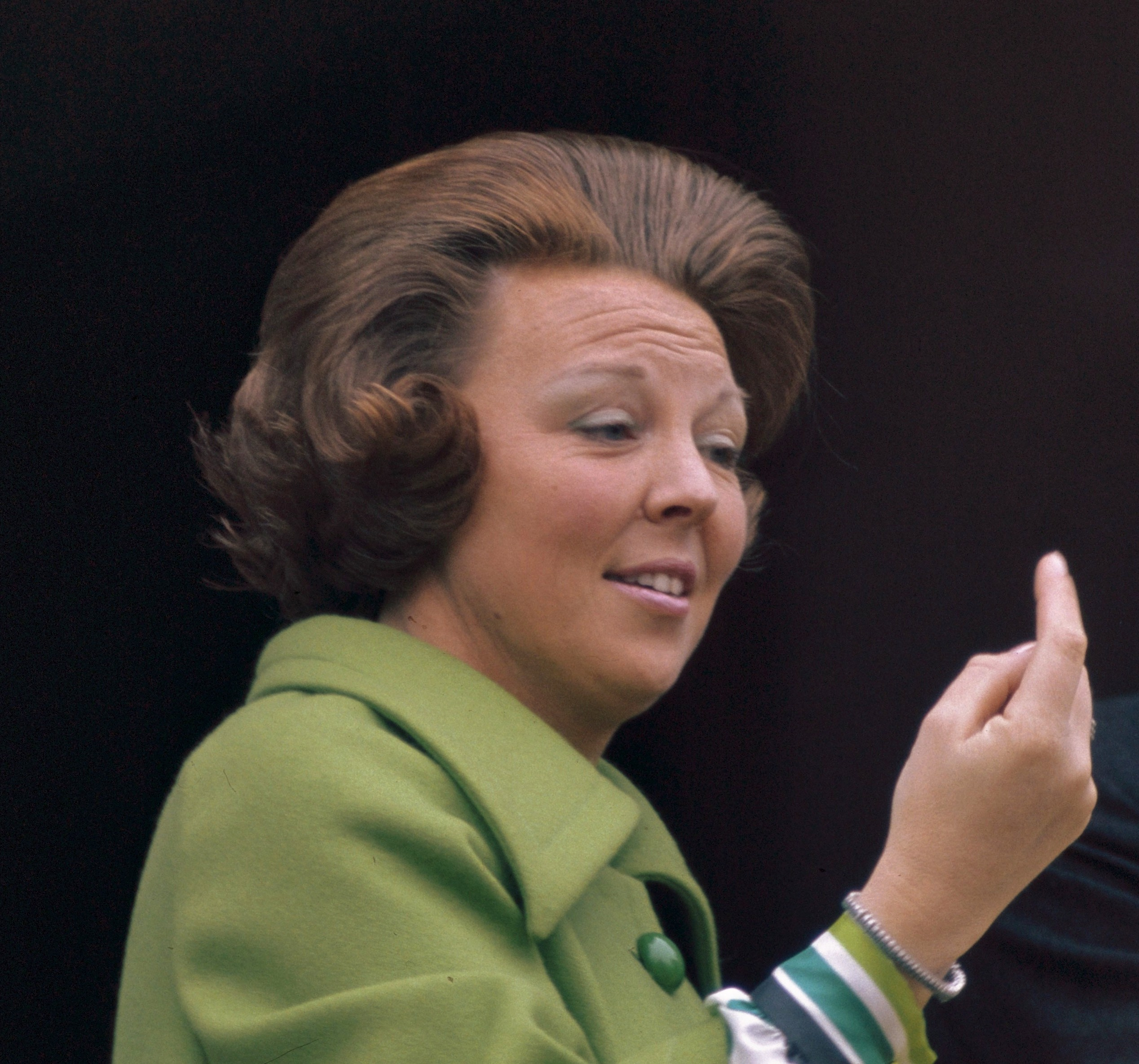 De koninklijke familie tijdens het defile bij paleis Soestdijk op Koninginnedag